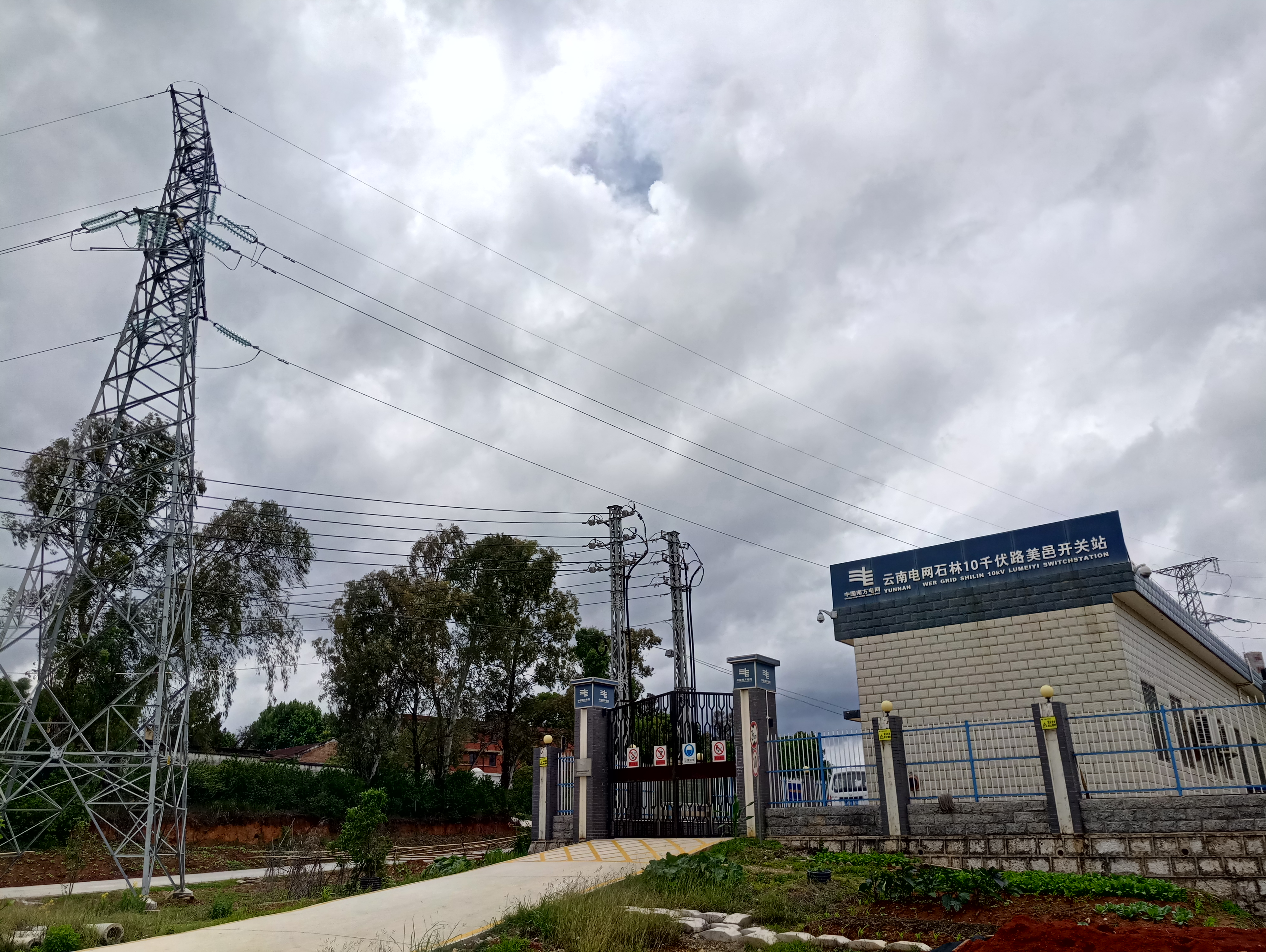 云南电网石林10千伏路美邑开关站